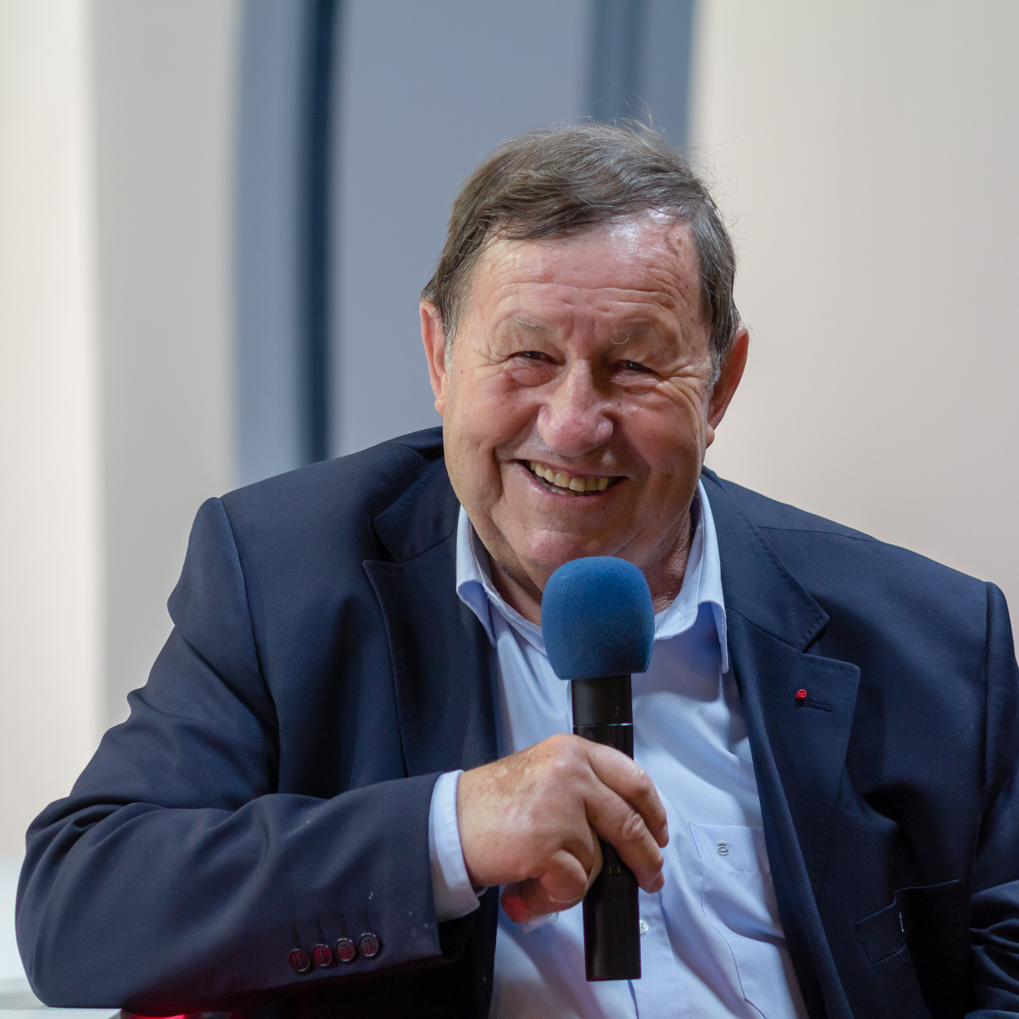 Guy Roux en conférence à l'espace Ouest-France de Rennes le 14 mai 2014 pour la présentation de son livre « il n'y a pas que le foot dans la vie. »